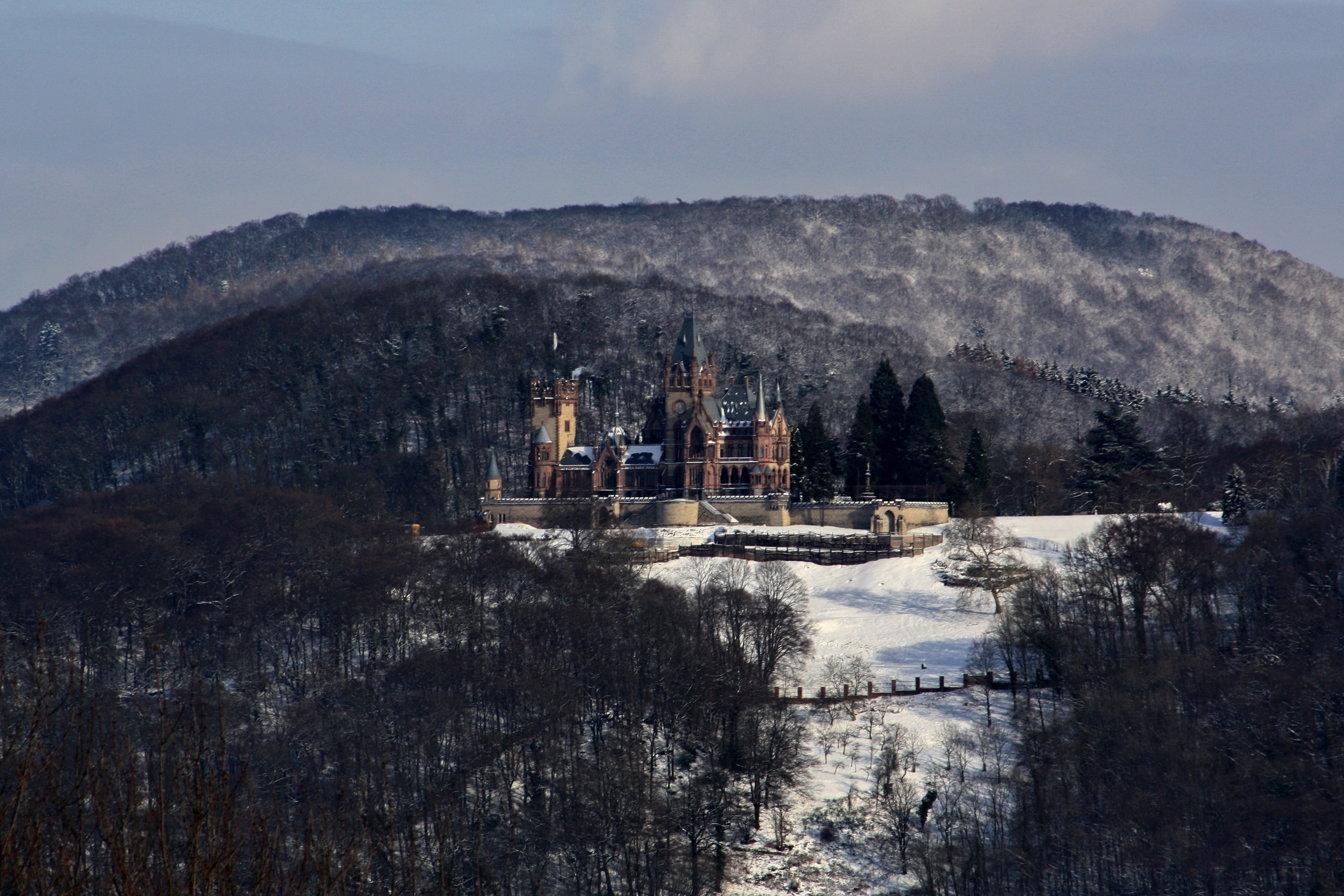 Blick vom Rodderberg auf Schloss Drachenburg